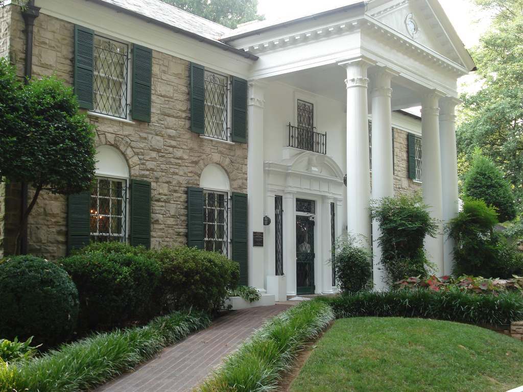 Graceland w 30 lat po śmierci Elvisa